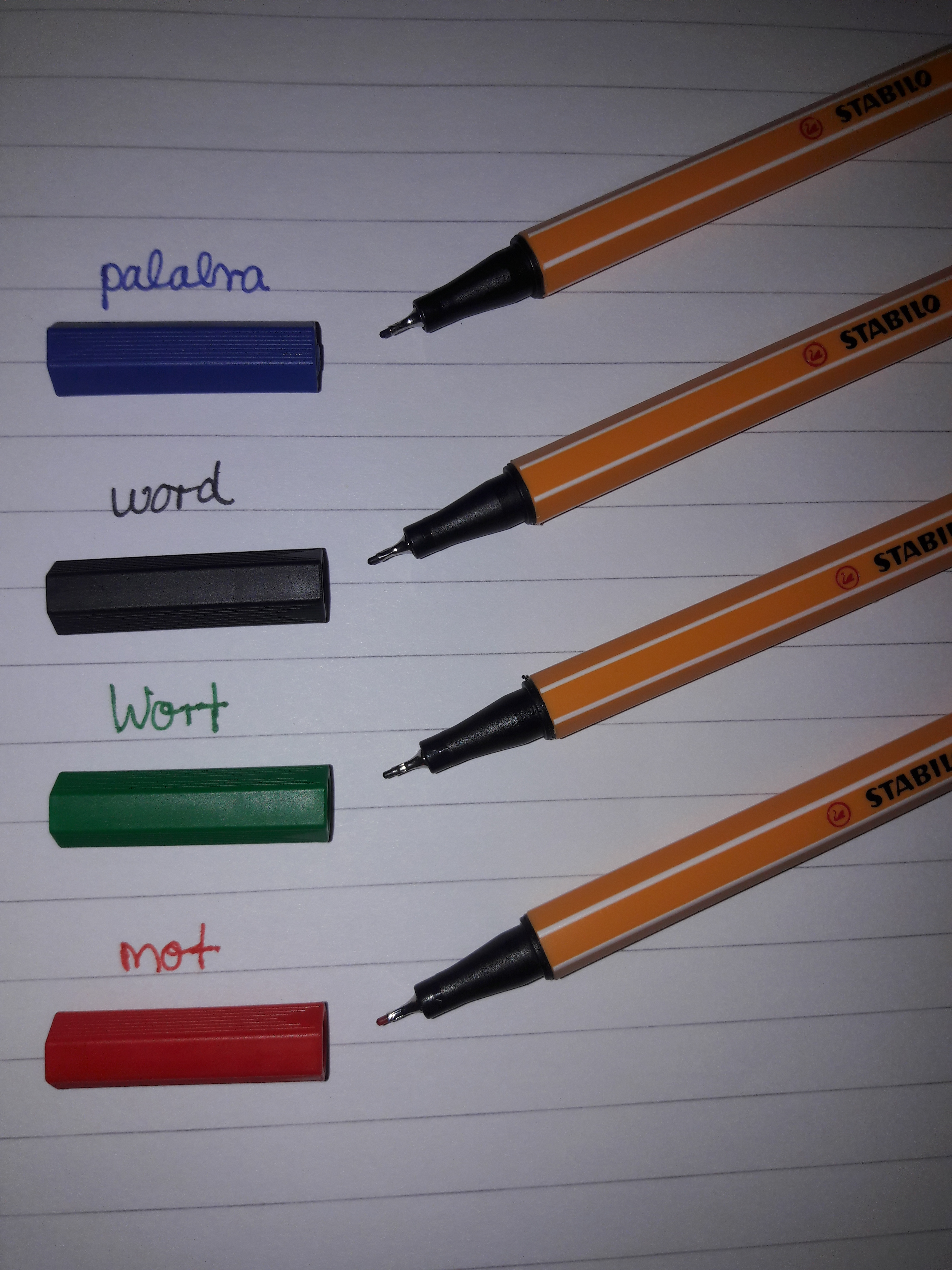 Stabilo Point 88 - Fineliner